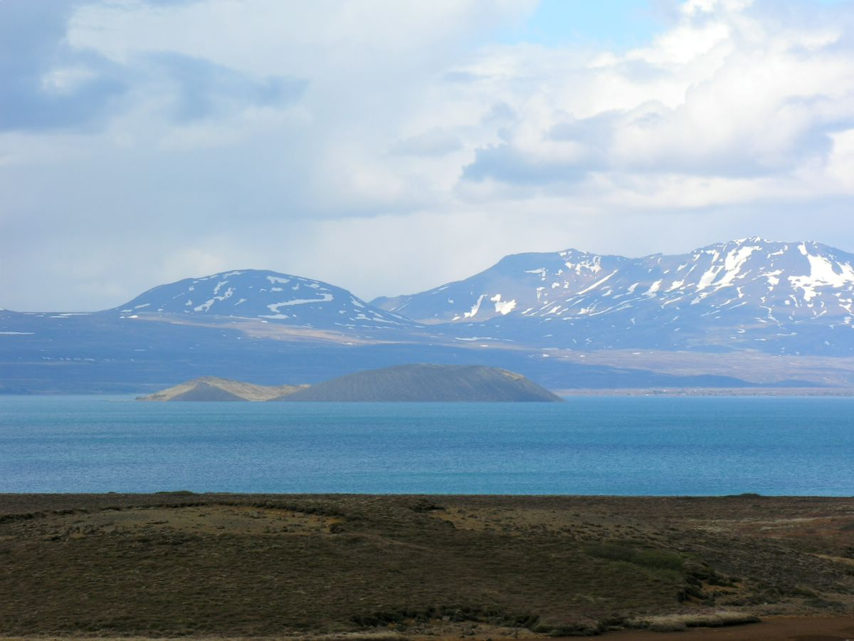 Þingvallavatn, Iceland